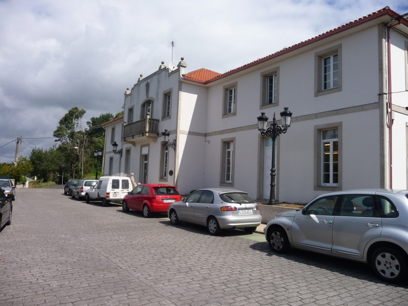 FOTO AYUNTAMIENTO DE CESURAS